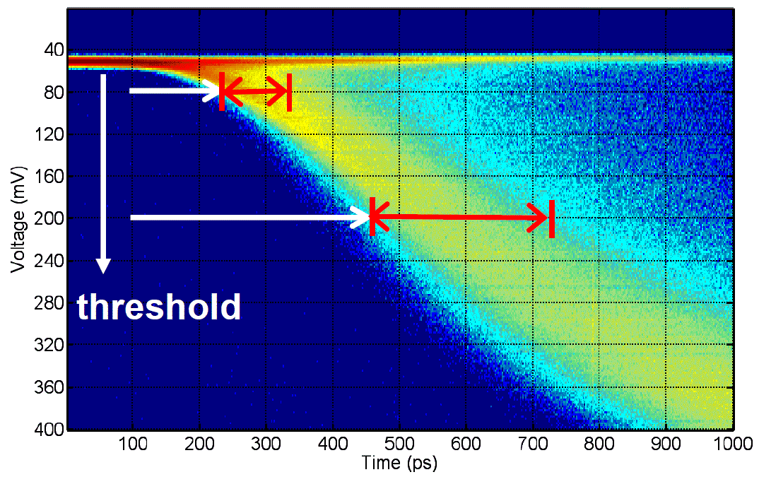 Esempio di fronte di corrente e di dispersione del segnale all'aumentare della soglia di rilevamento